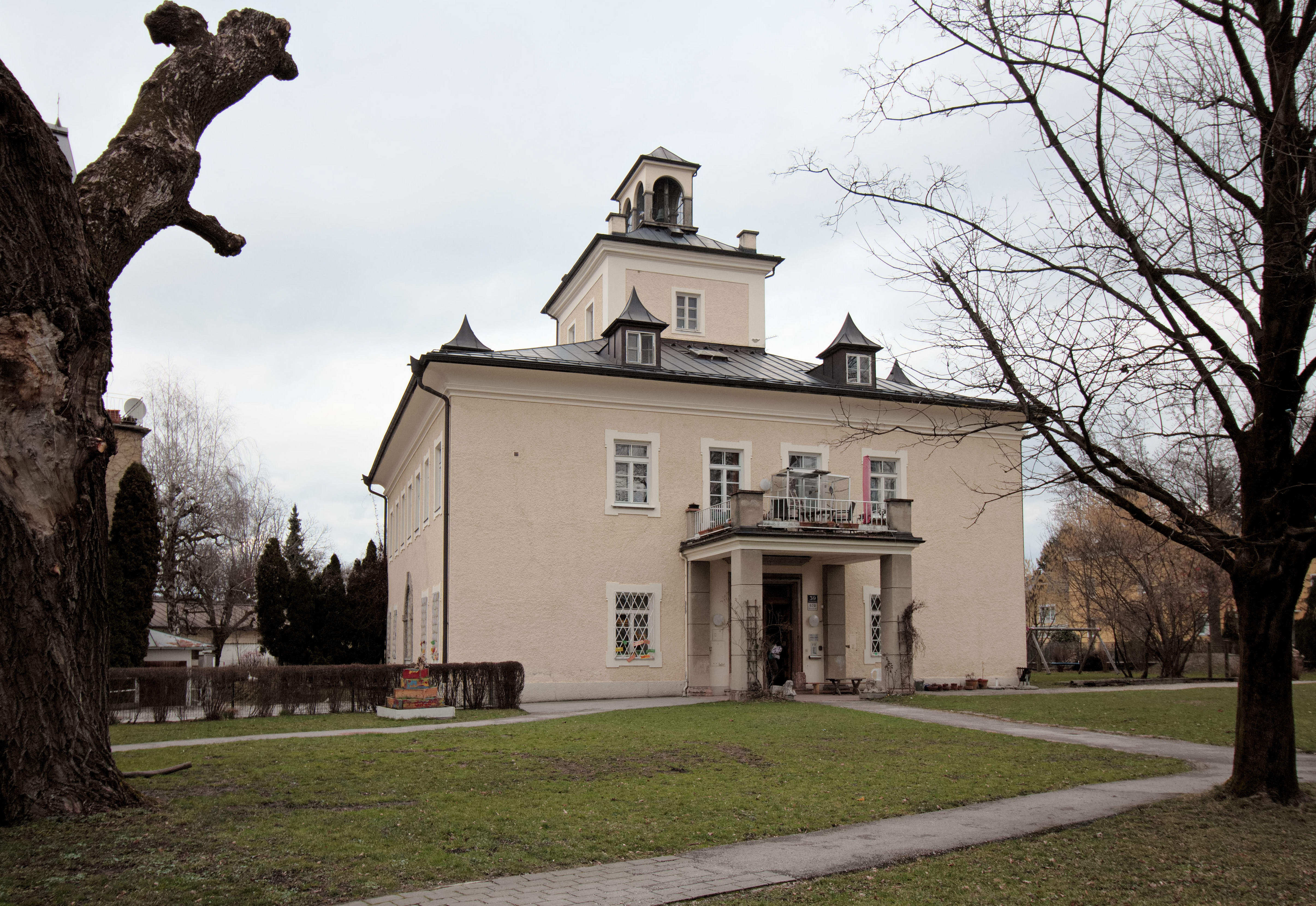 Ehemaliges Caspisschlössl in der Salzburger Elisabethstraße, jetziger Pfarrhof der Kirche Salzburg-St. Elisabeth mit Pfarrkindergarten